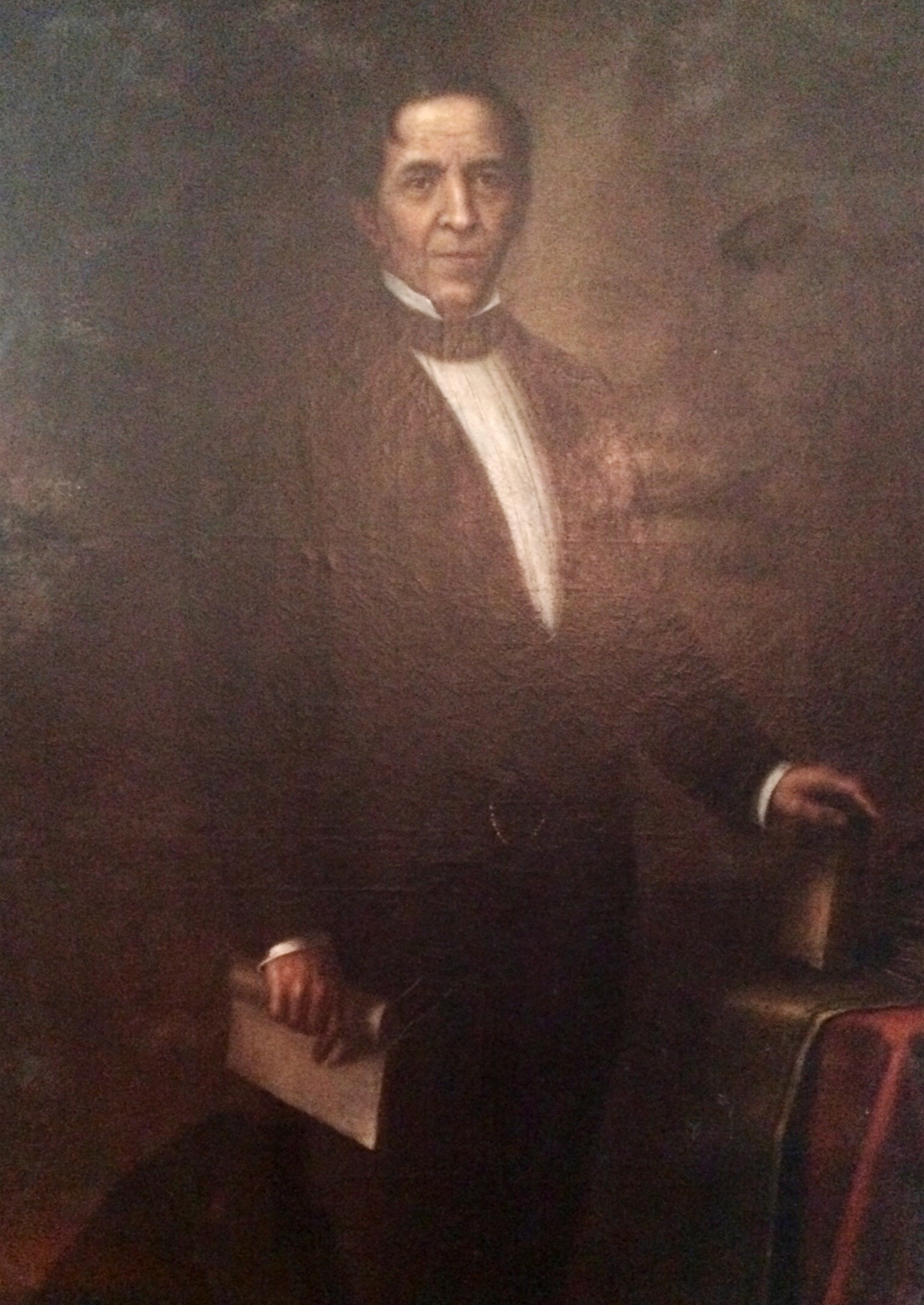 Dr. Mariano Galvez. Presidente del Estado centroamericano de Guatemala de 1831 a 1837.